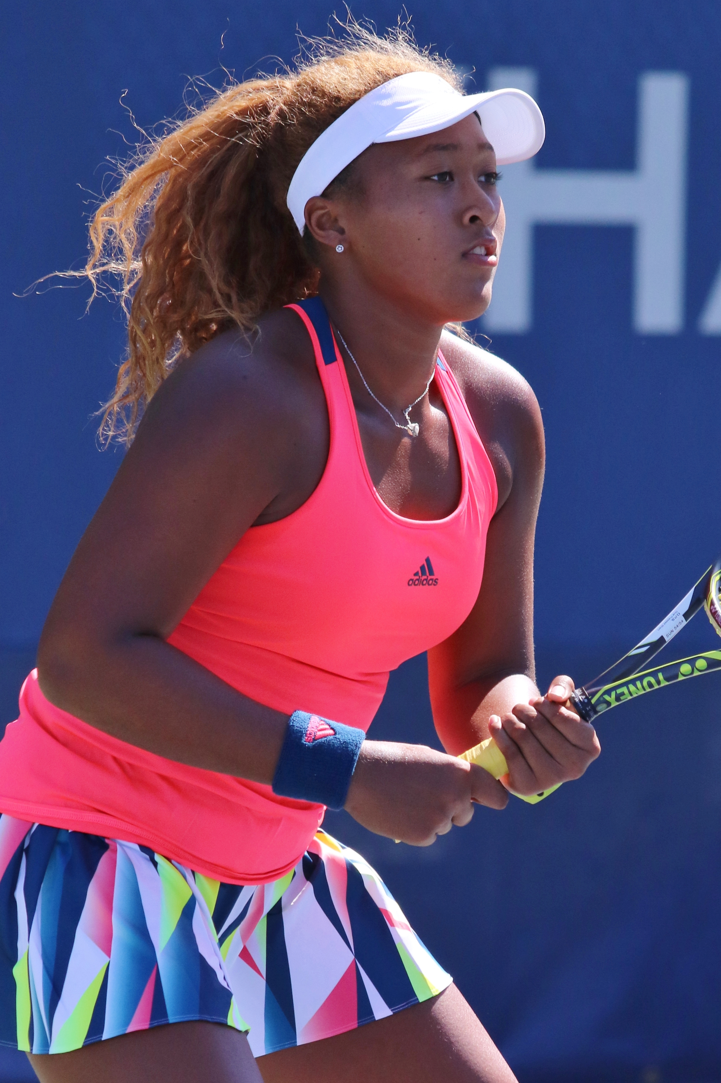 Osaka US16 (17)